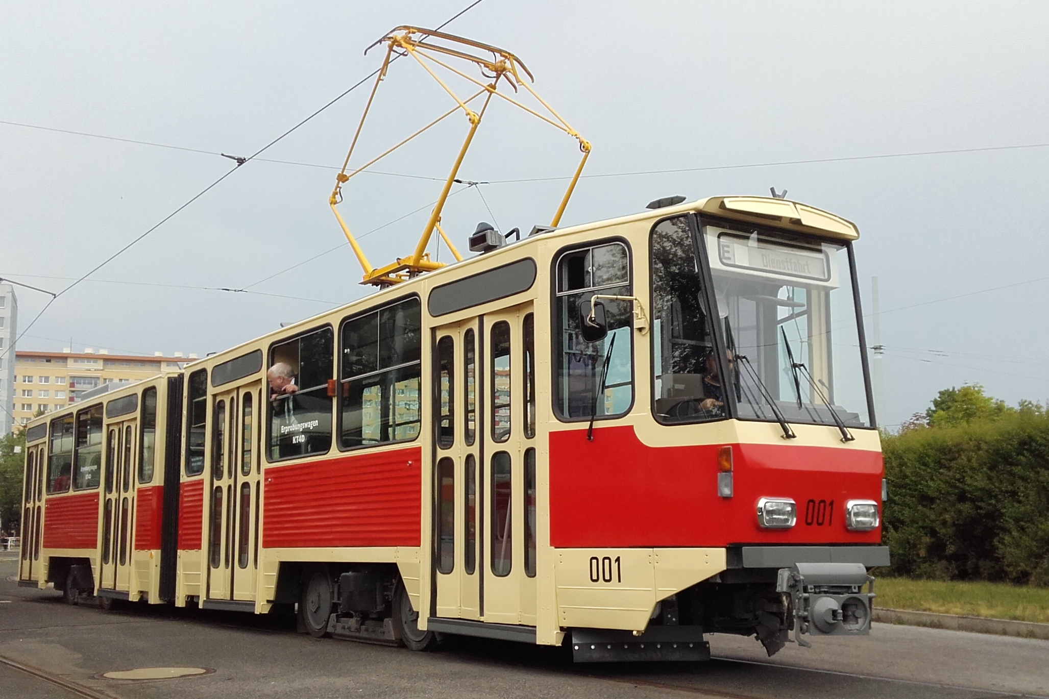 Prototyp tramvaje KT4 z Postupimi po generální opravě v Ústředních dílnách DP hl.m. Prahy při prezentační jízdě ve smyčce Sídliště Ďáblice.